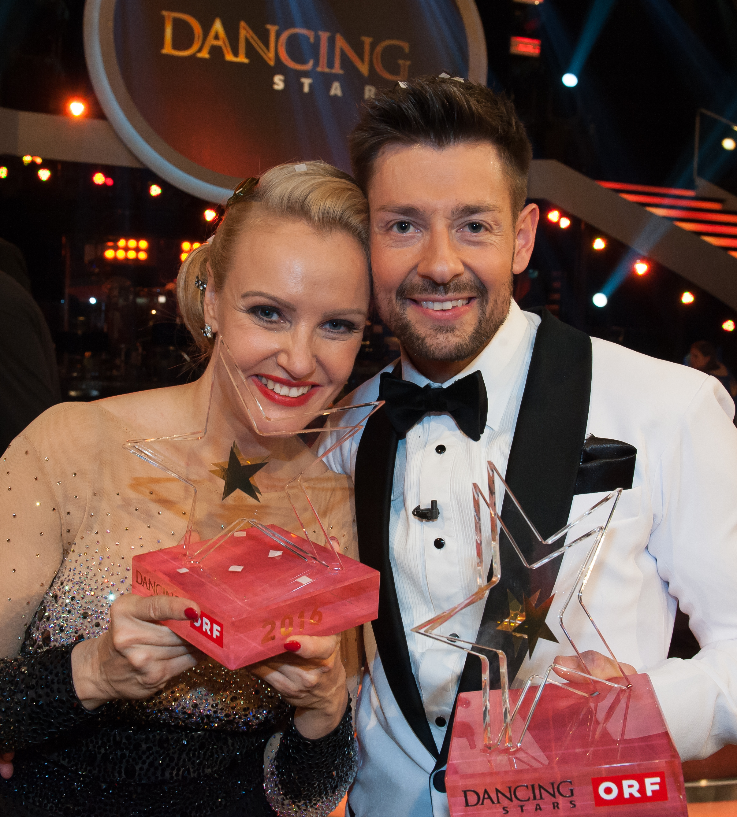 ORF Dancing Stars - Das Finale am 6. Mai 2016 im ORF-Zentrum Wien. Bild zeigt Verena Scheitz und Florian Gschaider.